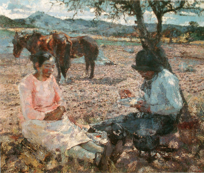 La Mazamorra